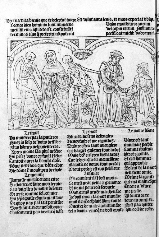 La Danse macabre. Paris, Guy Marchant, 1486 : Un moine, un usurier et un pauvre. Illustration numérisée d'après le microfilm R 1760, Paris, BnF (Réserve des Livres rares et précieux), cote : Res Ye 189/Microfilm R 1760